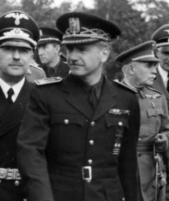 Ramón Serrano Súñer, político franquista español, visita la Alemania nazi en 1940.